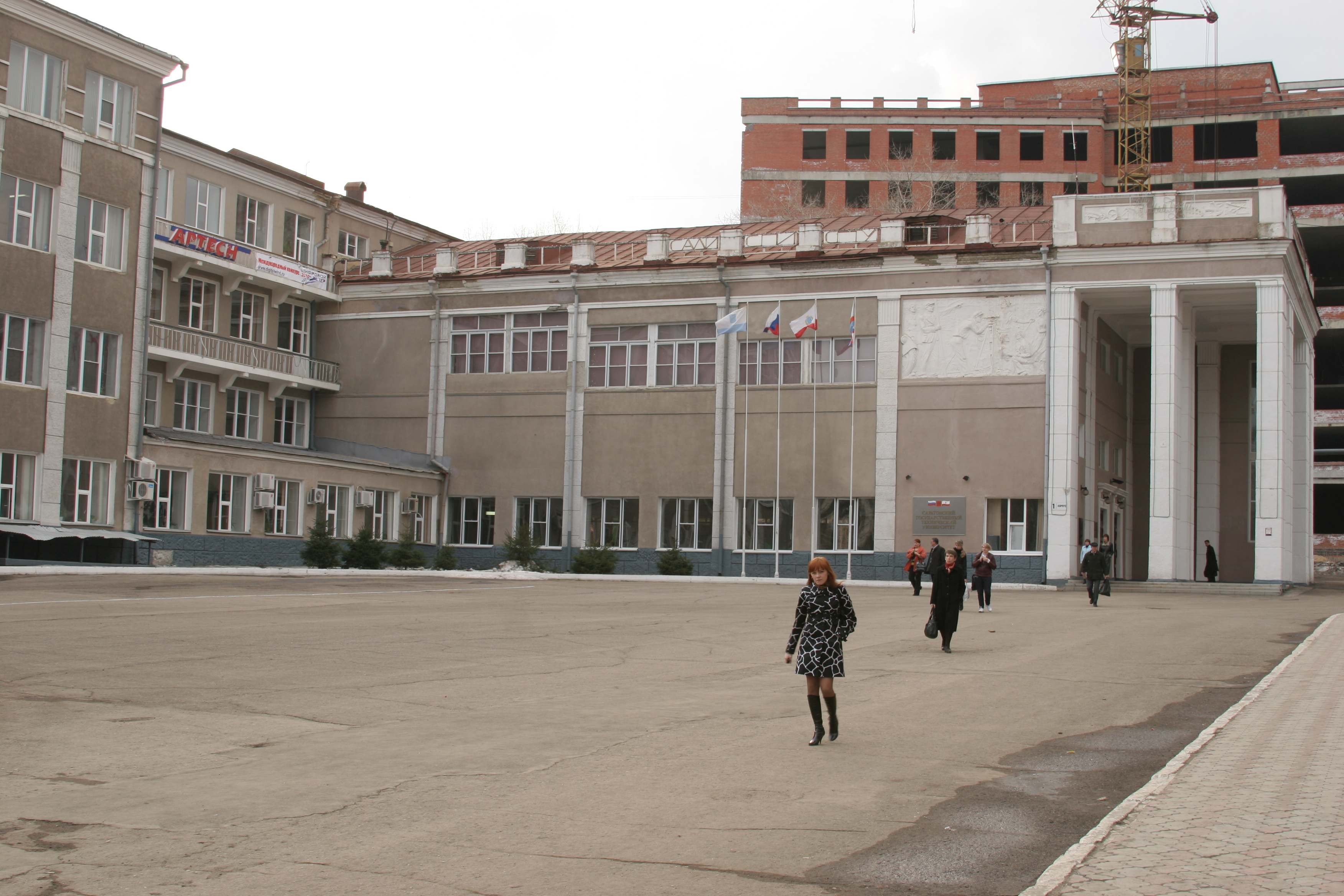 Саратовский политехнический университет